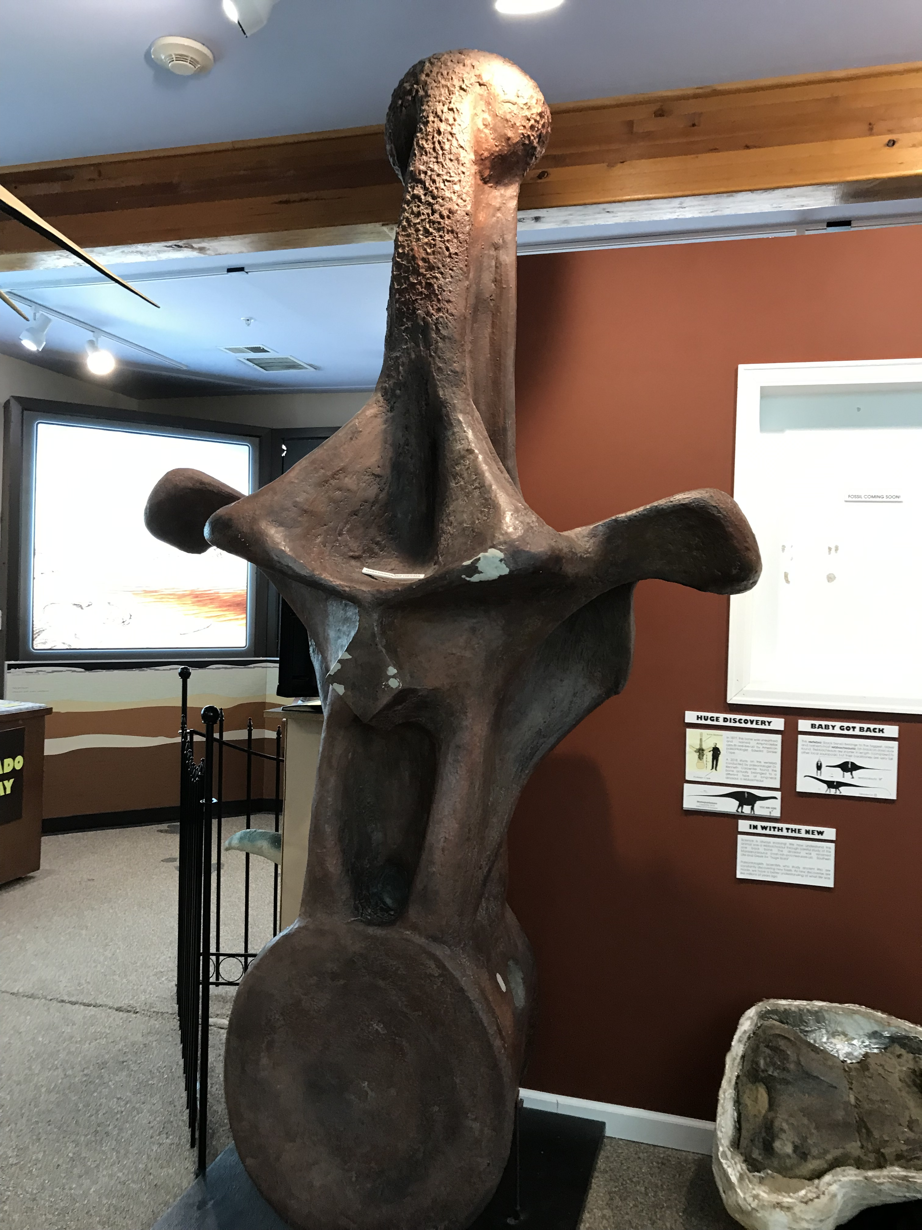 マラアプニサウルスの復元された椎骨。